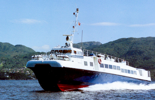 MS Fjordglytt på Byfjorden i 1990.